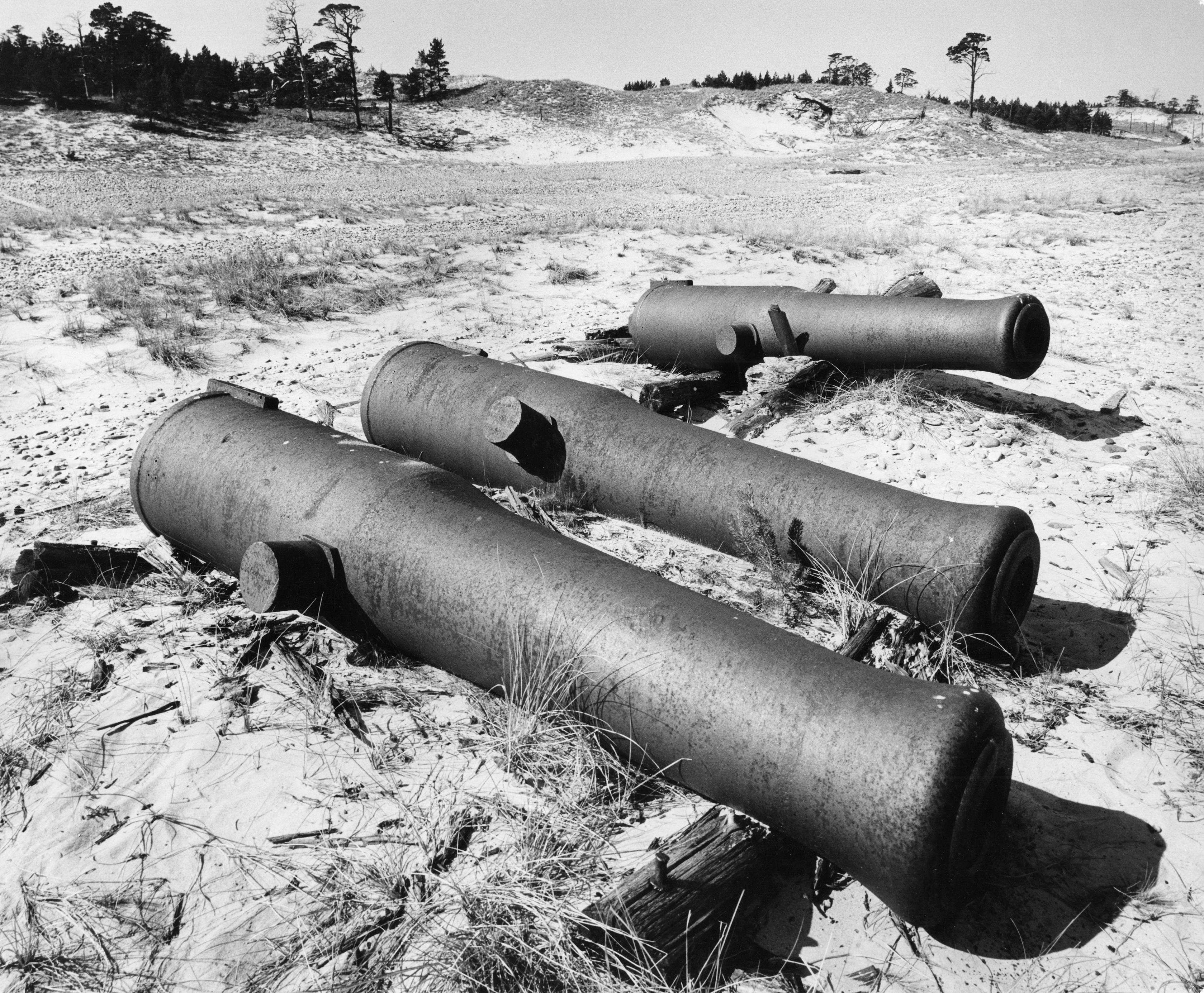 Ryska kanonerna vid Franska bukten. Bilden troligen från mitten av 1960-talet. Motiv: Gotska Sandön Kategori: Kust- och skärgårdsmiljö Ryska kanonerna vid Franska bukten. Bilden troligen från mitten av 1960-talet.